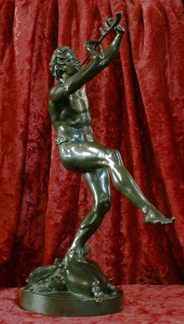 Description : Faune dansant - bronze à patine verte- 52 cm (collection particulière) Sculpture de Lequesne, fonderie Susse, XIXe siècle français. Un exemplaire monumental existe au Jardin du Luxembourg à Paris. Ce tirage, destiné à une clientèle bourgeoise, porte par pudeur un ajout à l'original : une ceinture de lierre couvrant le sexe. Le personnage porte de petites cornes, des pampilles, et une queue de chèvre. Il est couronné de pin et joue de la flûte. Il est en équilibre instable sur une outre en peau de chèvre gonflée d'air. A ses pieds on trouve un thyrse, un tambourin, des cymbales, et de la vigne avec des raisins. Auteur : --DS 14 oct 2004 à 15:32 (CEST) Licence